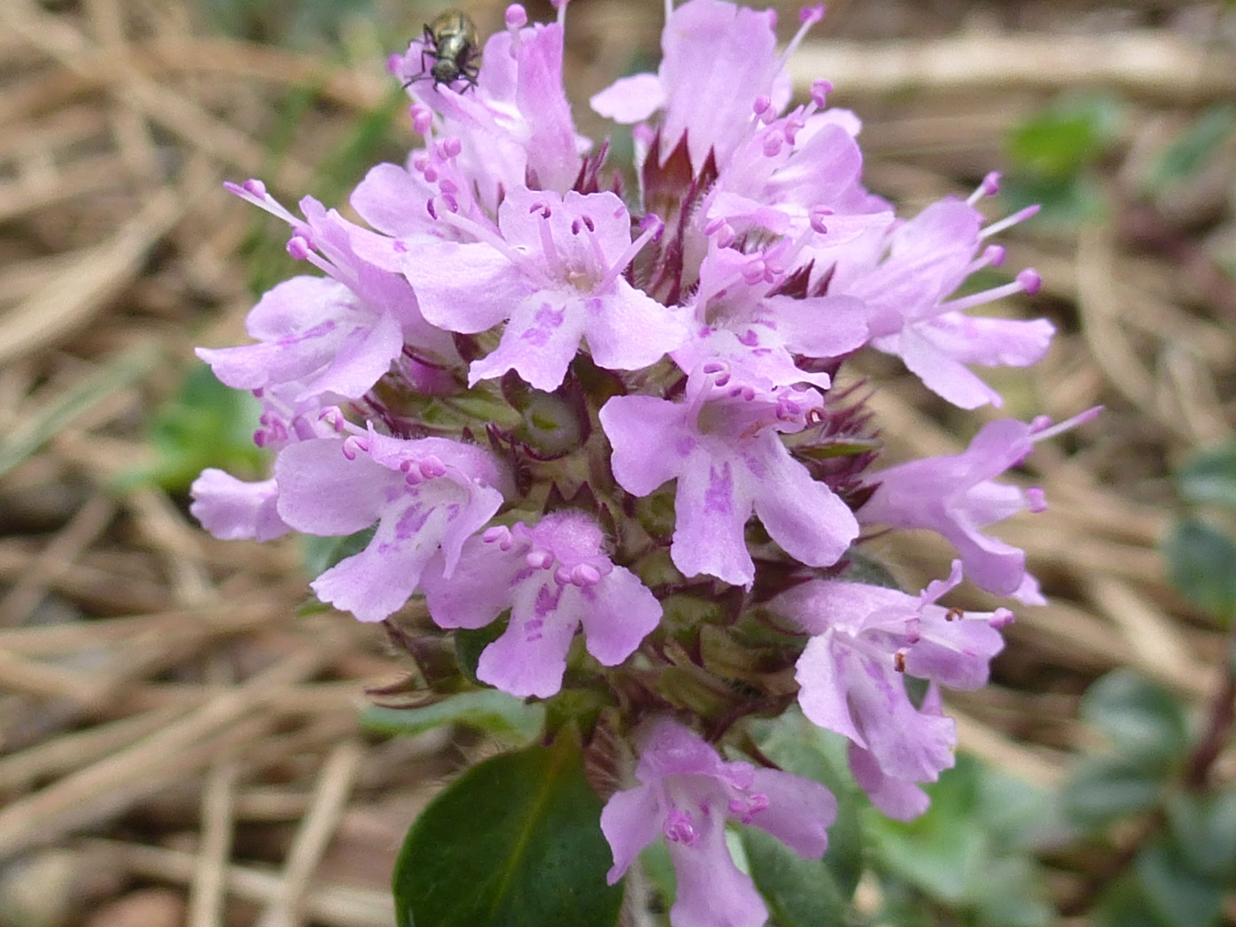 Breitblättriger Thymian; Standort: Hoher Lindkogel-Helenental This media shows the nature reserve in Lower Austria with the ID 62.